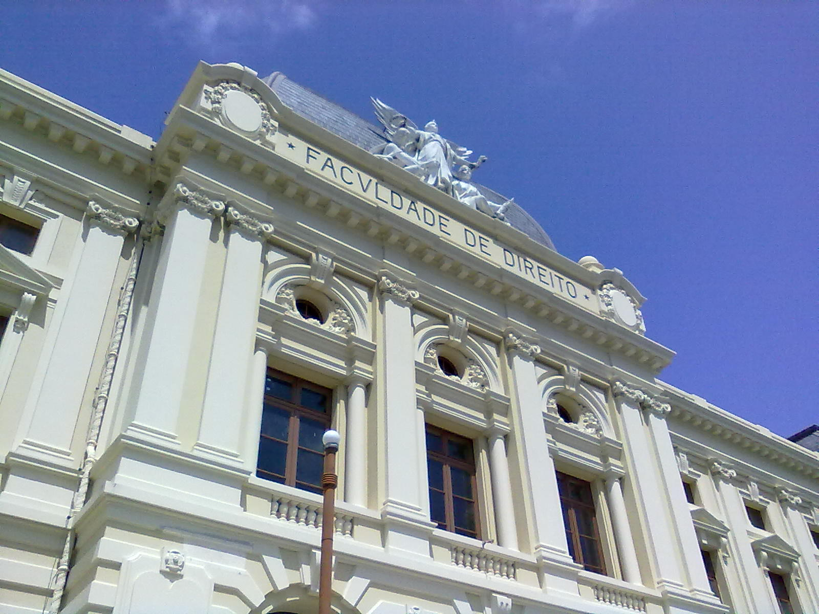 Arquitetura